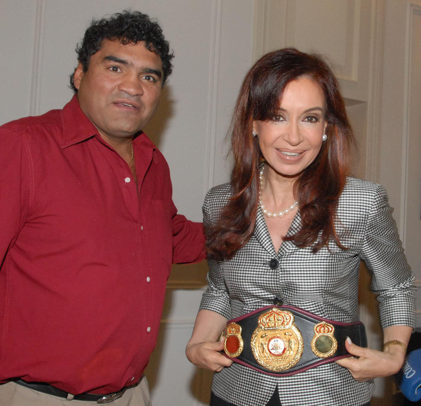 El ex boxeador Jorge Locomotora Castro junto a la presidente de Argentina, Cristina Kirchner.